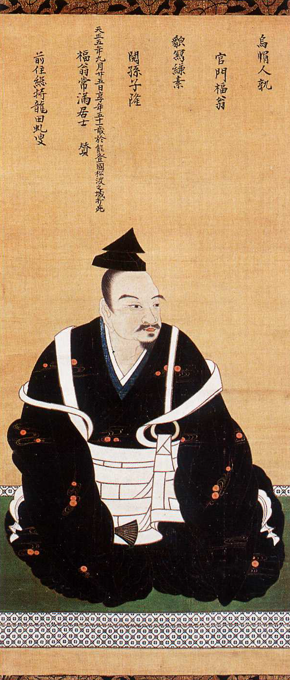 松波義親の肖像。